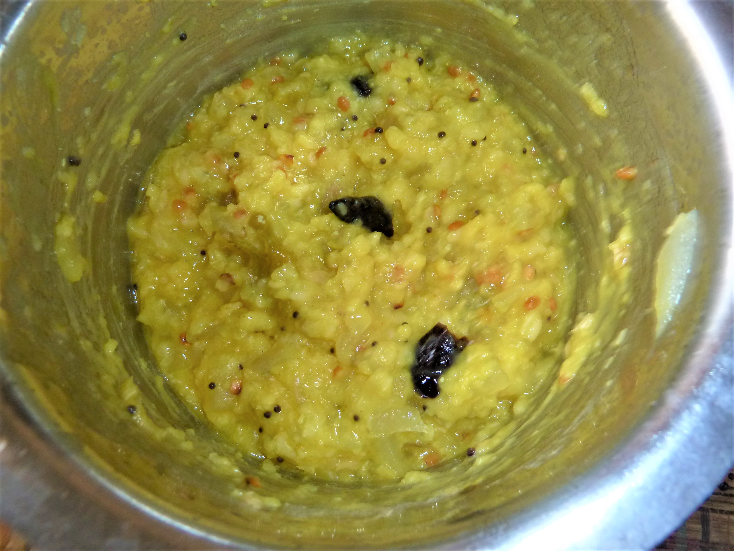 సొరకాయ పప్పు